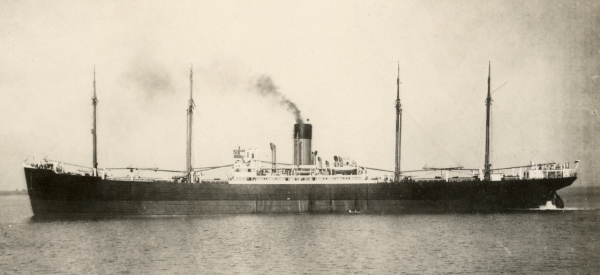 Der Schnellfrachter ALSTER des NDL